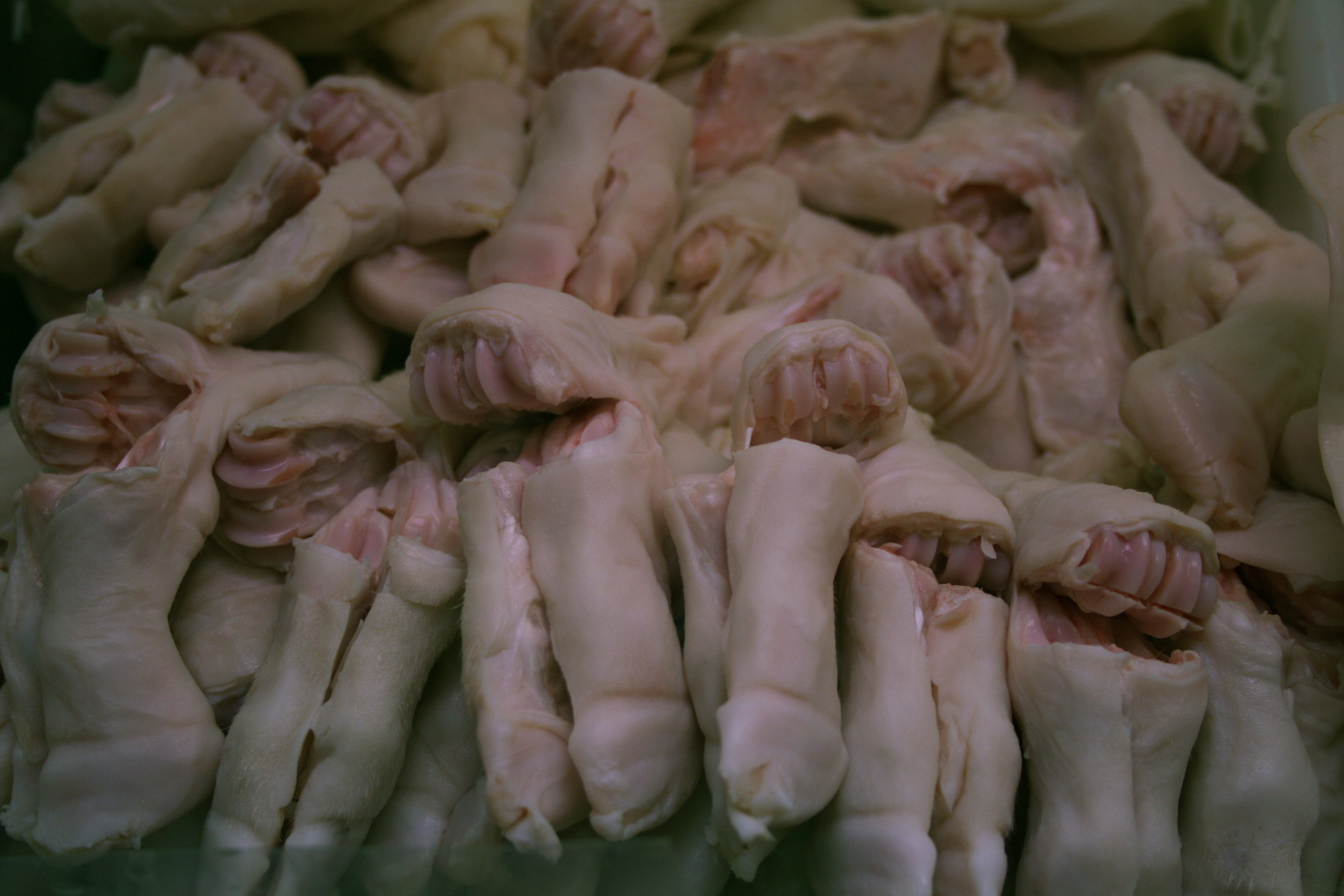 Manos de ternasco cortadas y comercializadas en el mercado central de Zaragoza